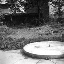 Bundesgartenschau 1957 in Köln - Hausgarten